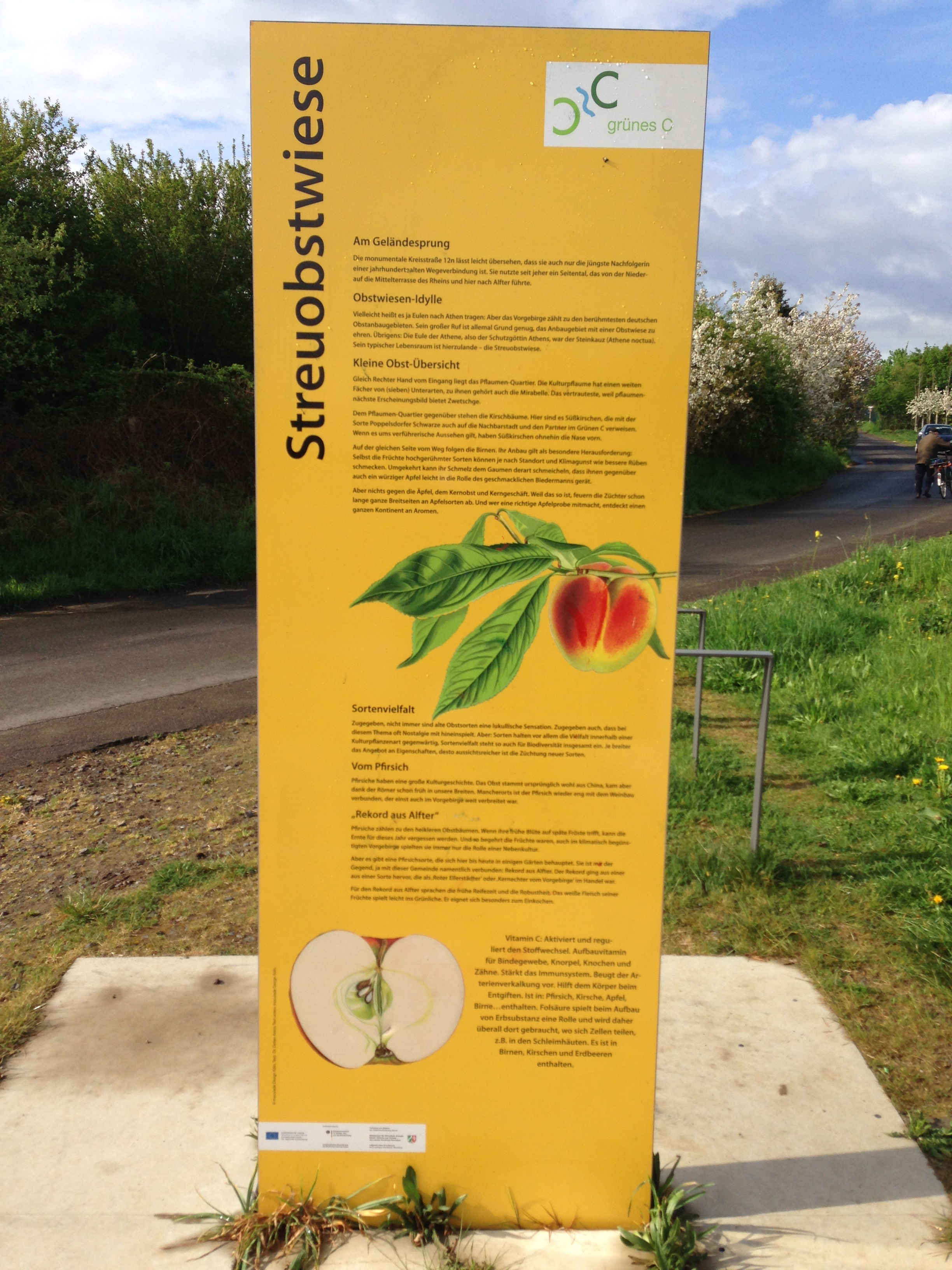 Infotafel 'Streuobstwiese' in Alfter